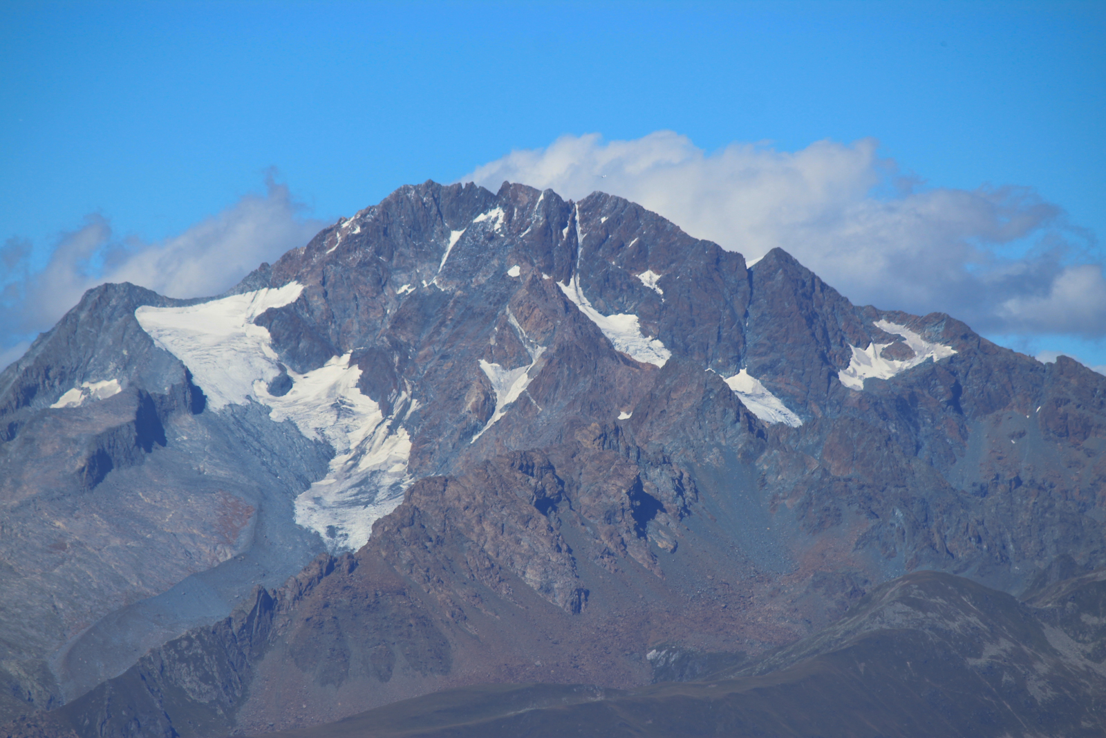 Monte Disgrazia dal Ponteranica